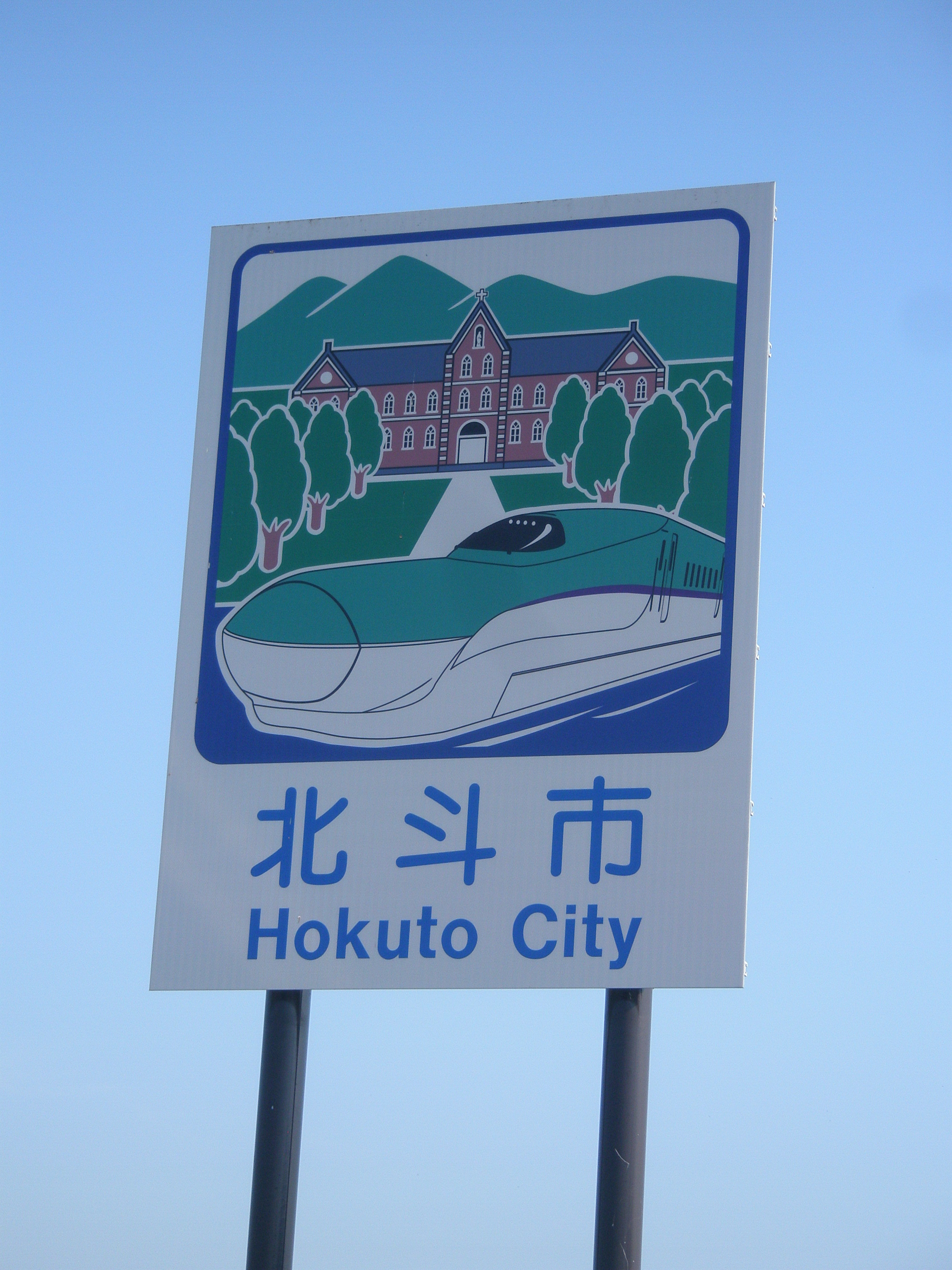 北斗市カントリーサイン（2019年5月撮影）北海道道1176号新函館北斗停車場七飯線に設置の物